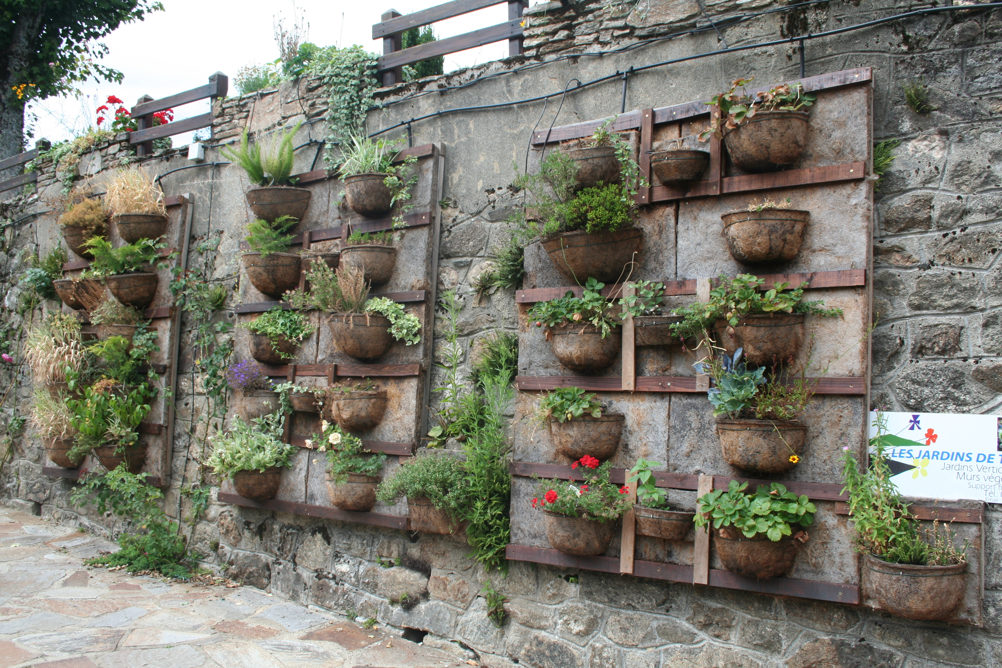 Fraisse-sur-Agout (Hérault) - jardin vertical.